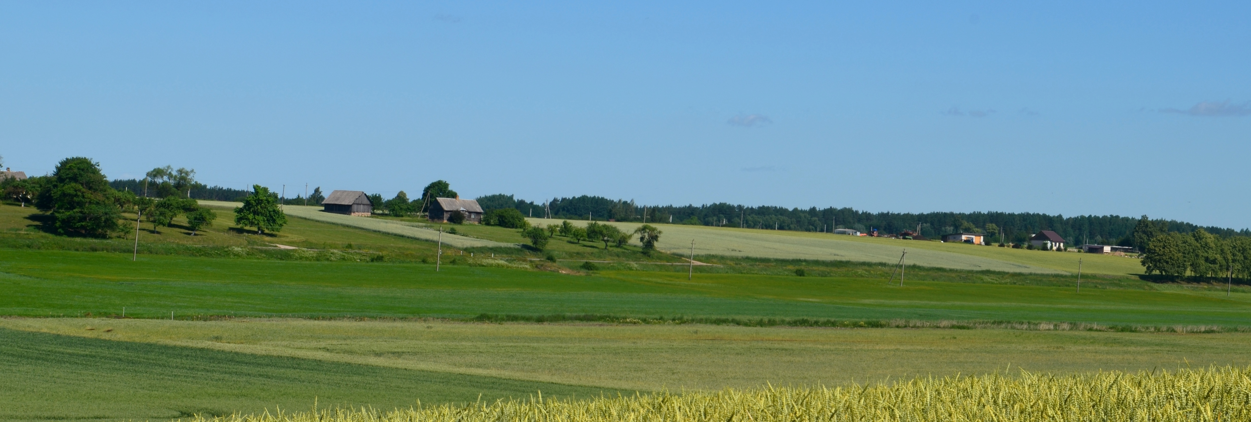 Dasiūnai, Kauno raj.